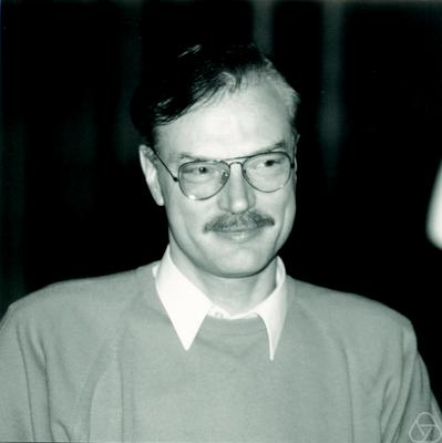 Foto di Gerhard Preuß